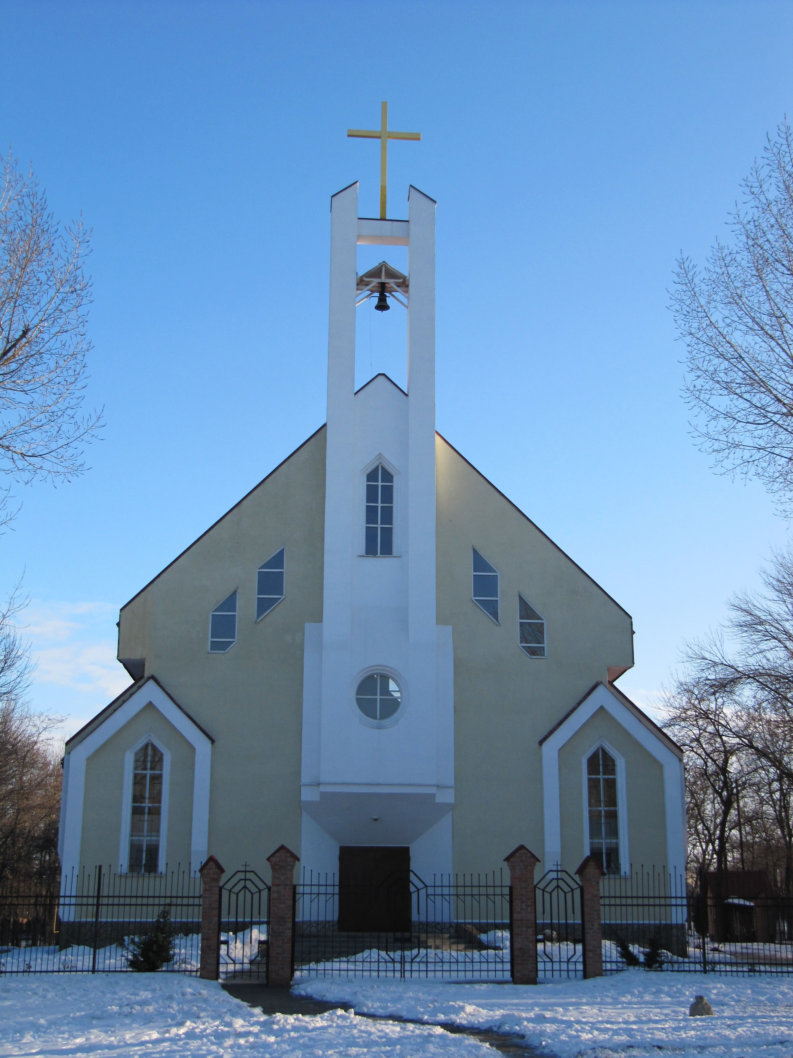 Католическая Церковь Тайной Вечери в Ростове-на-Дону